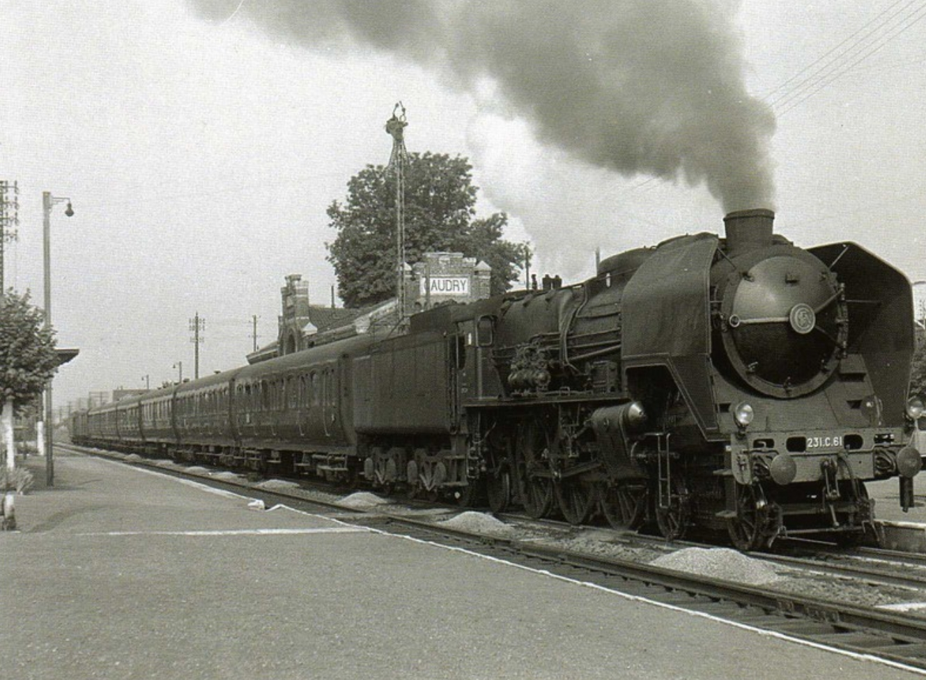 Locomotive Super-Pacific en gare de Caudry, Nord, Nord-Pas-de-Calais, France.